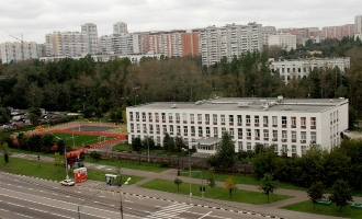 Вид на лицей №1580